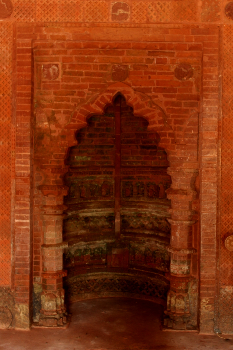 চুনাখোলা মসজিদ